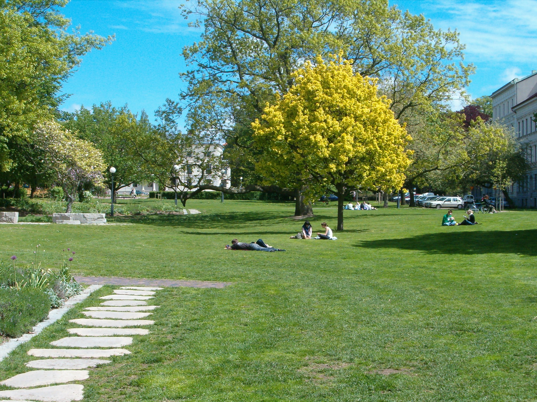 Stadsparken in Helsingborg, Sweden.